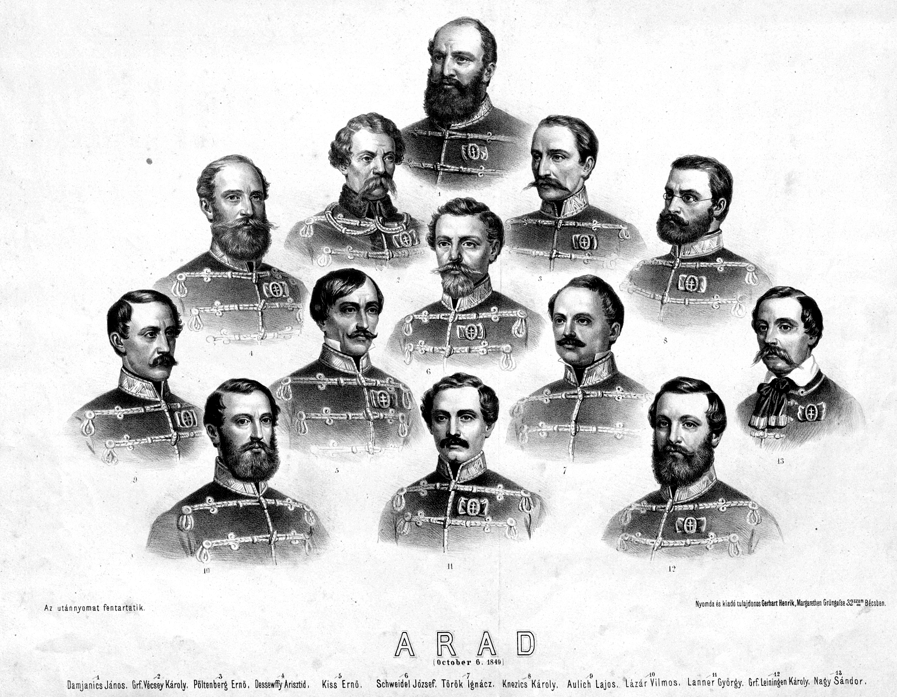 Az aradi tizenhárom vértanú emléklapja